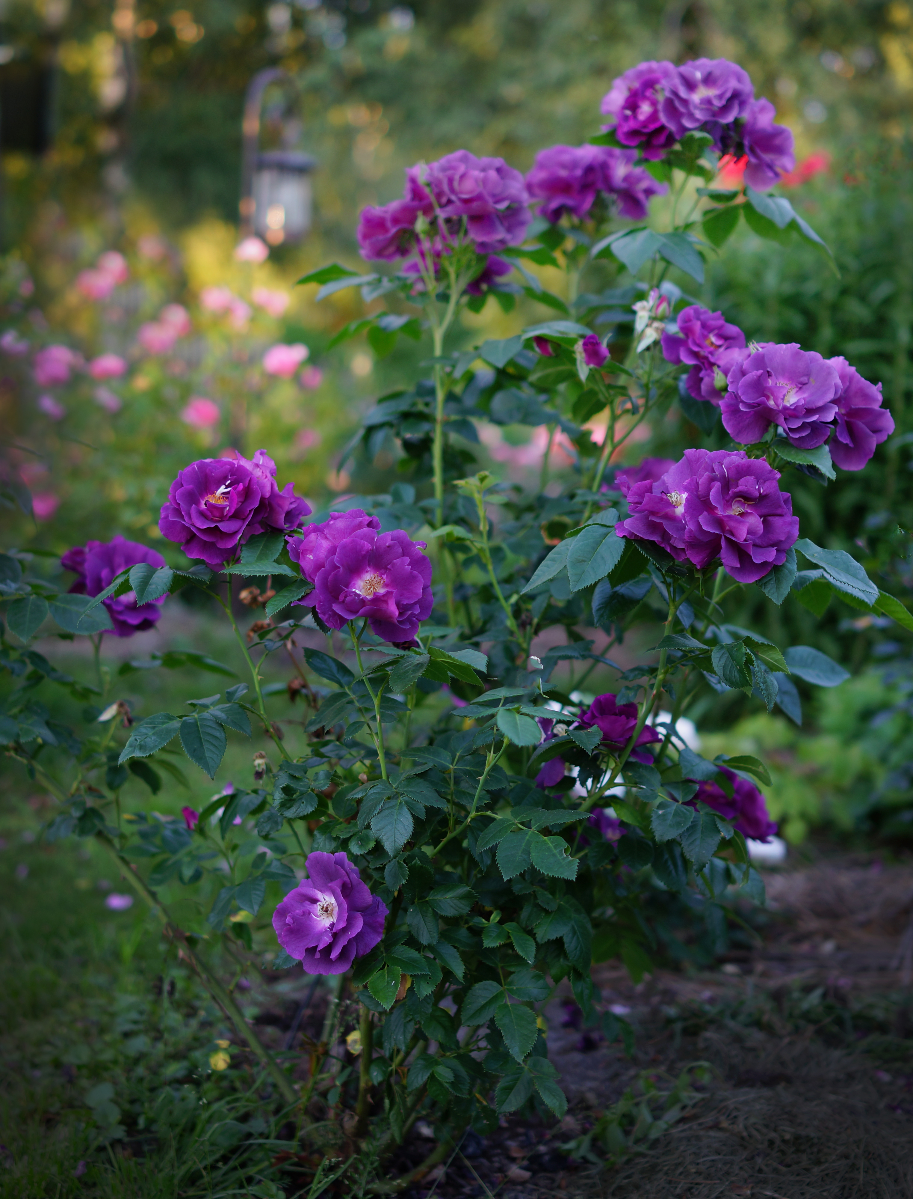 Россия, Владимирская область, частный сад